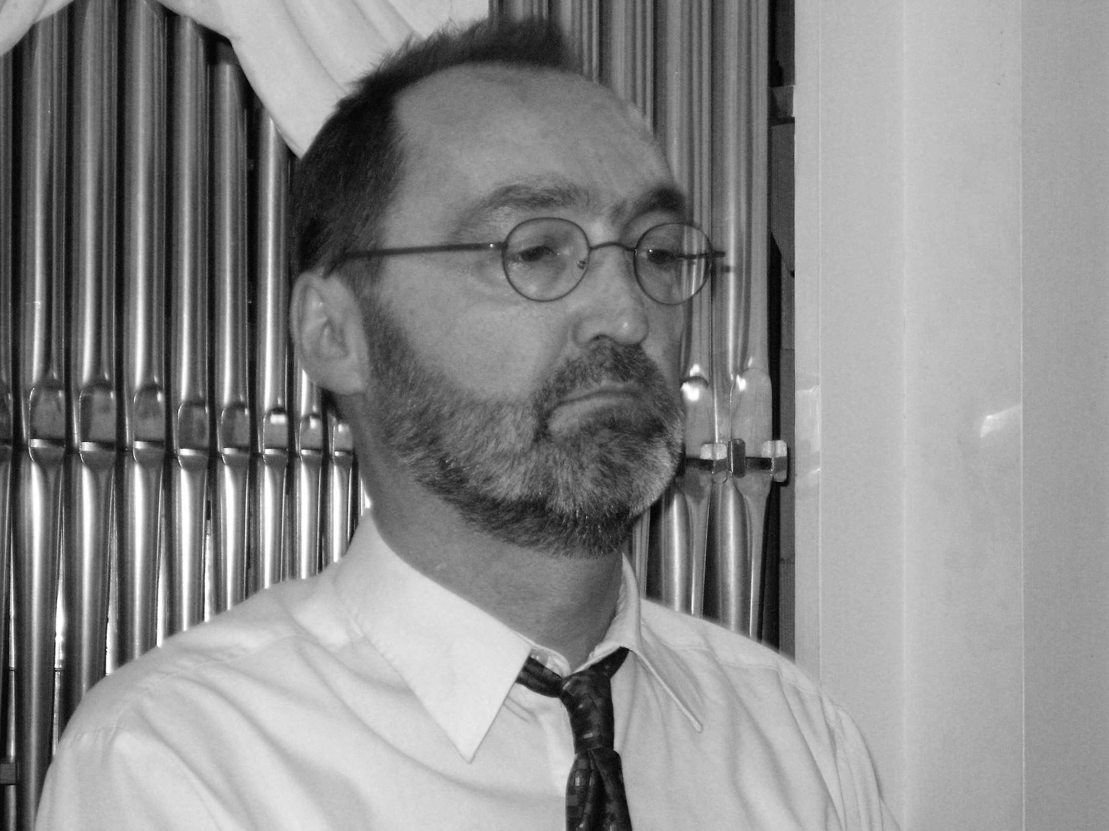 Domkapellmeister Gerhard Merkl an der Orgel in der Leonhardikirche in Lauingen (Donau)